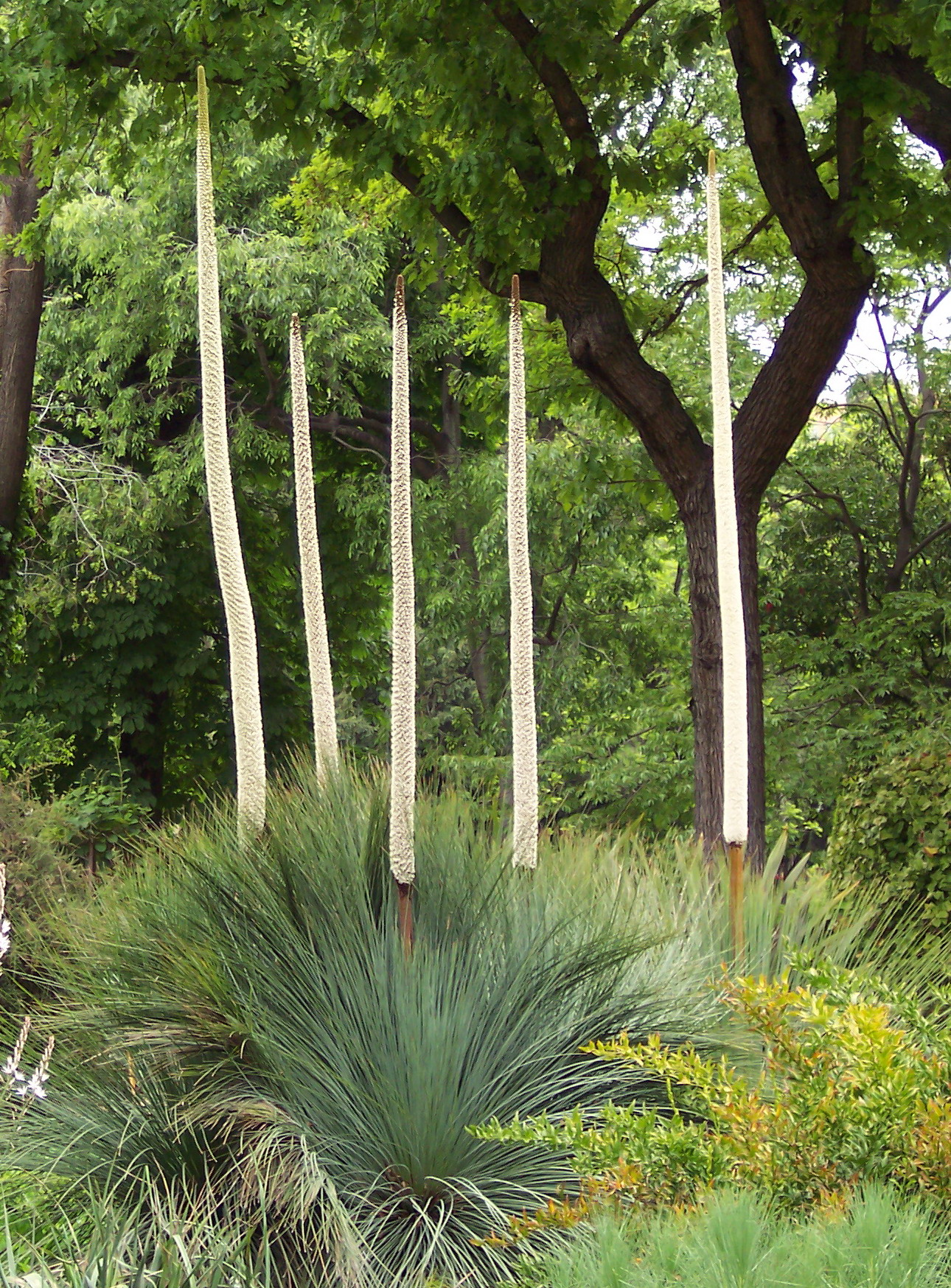 Xanthorrhoea quadrangulata. Real Jardín Botánico de Madrid.